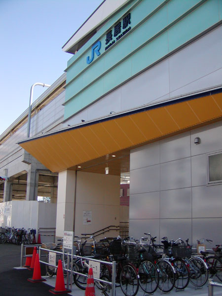 阪和線 長居駅。大阪市住吉区。 2007年3月、投稿者撮影。